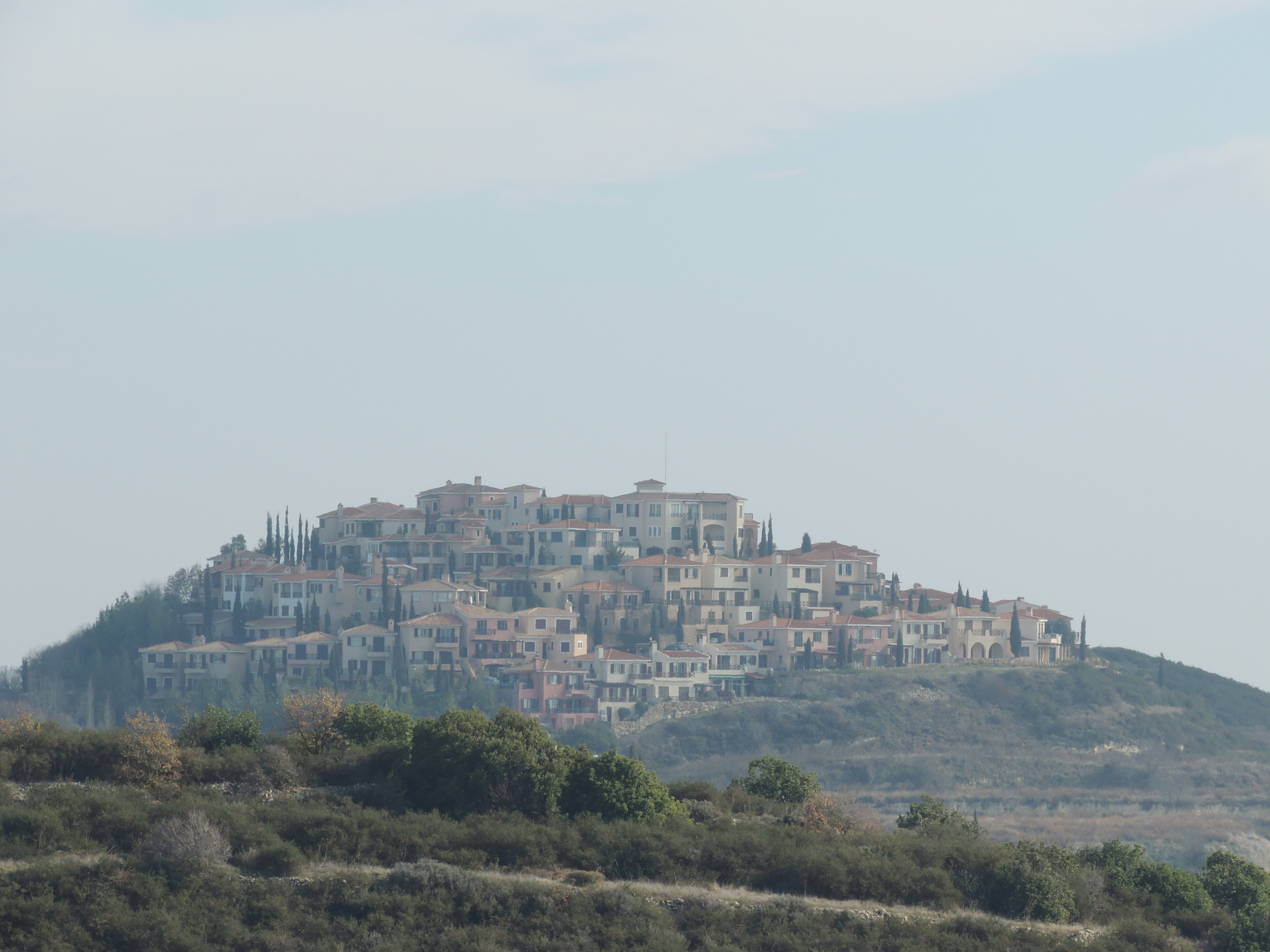 Tsada, Cyprus